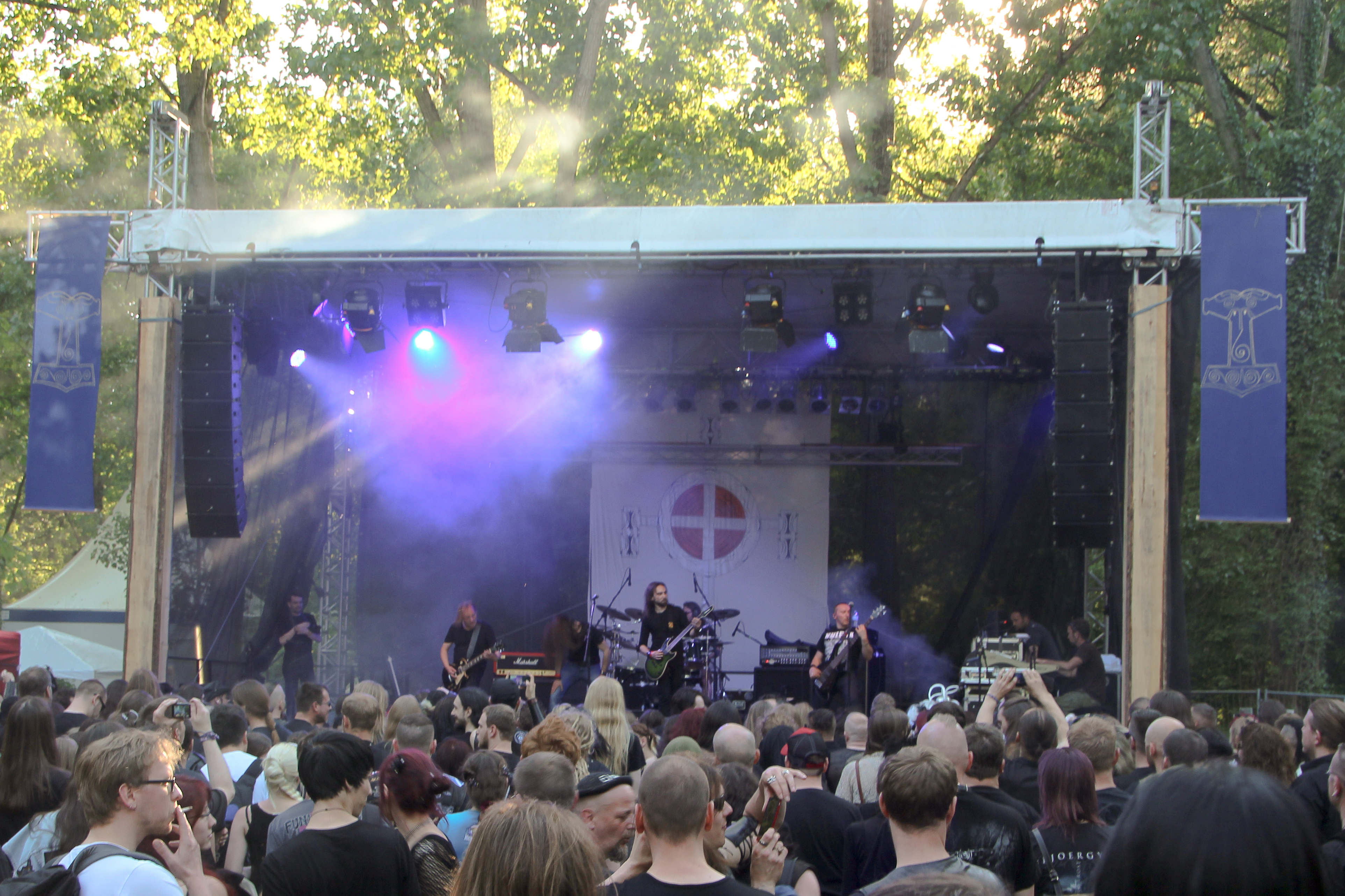 Fjoergyn auf dem Wave-Gotik-Treffen (Heidnisches Dorf) 2013 in Leipzig.